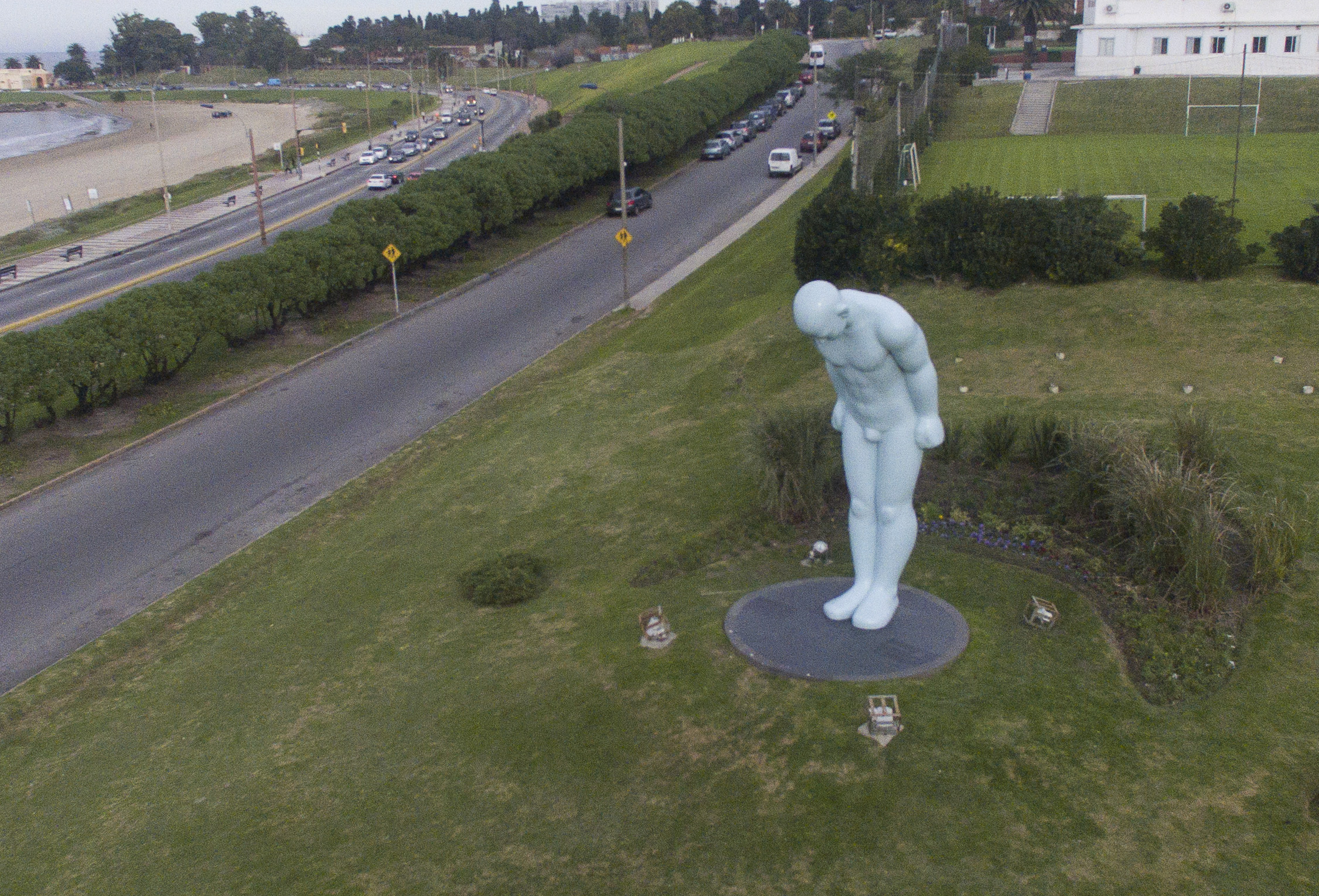 Monumento Coreano en la rambla de Montevideo